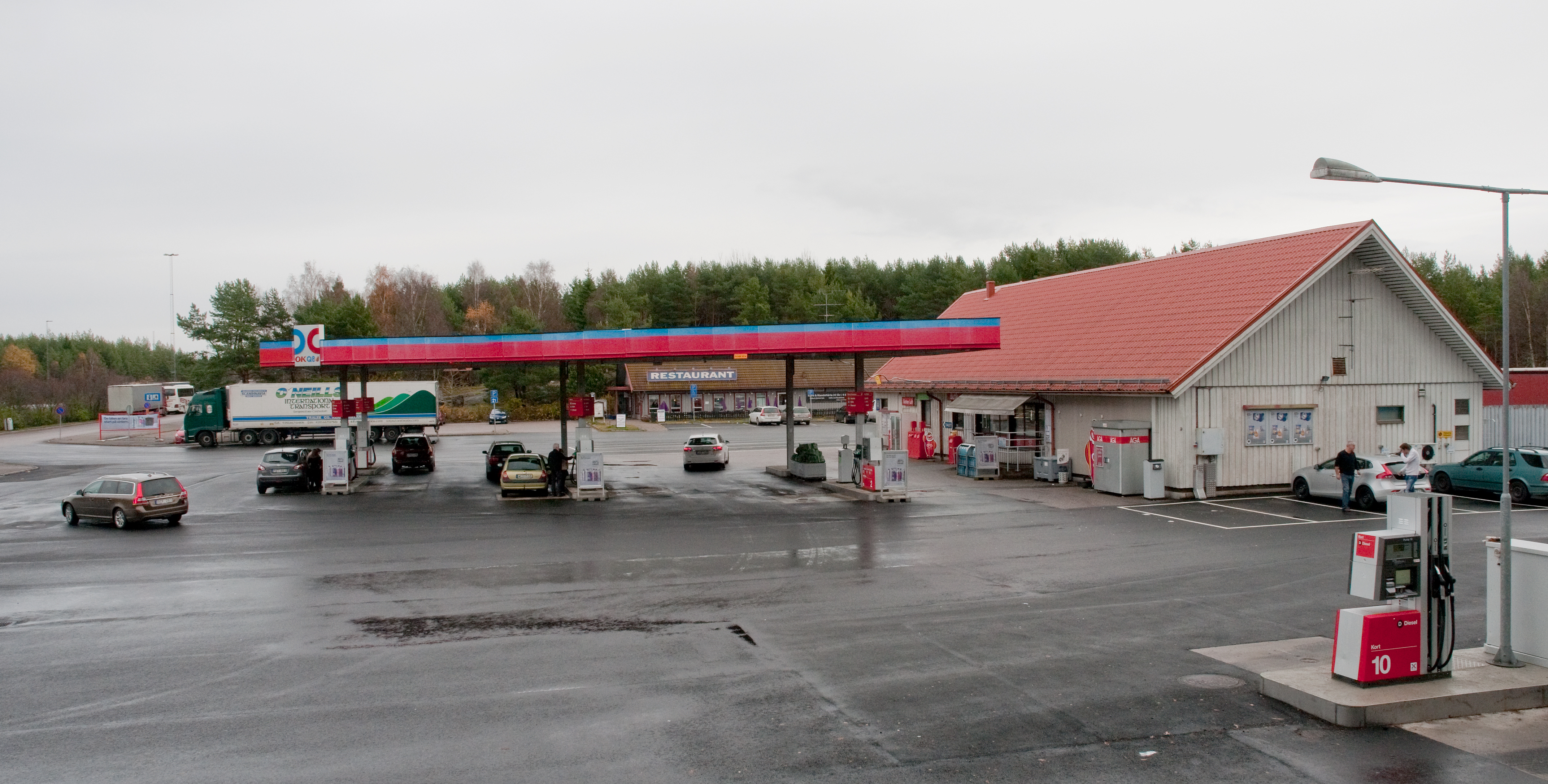 Sillekrog öster. Rastplats på E4 i Södermanlands län, sydost om Vagnhärad och 32 kilometer nordost om Nyköping.